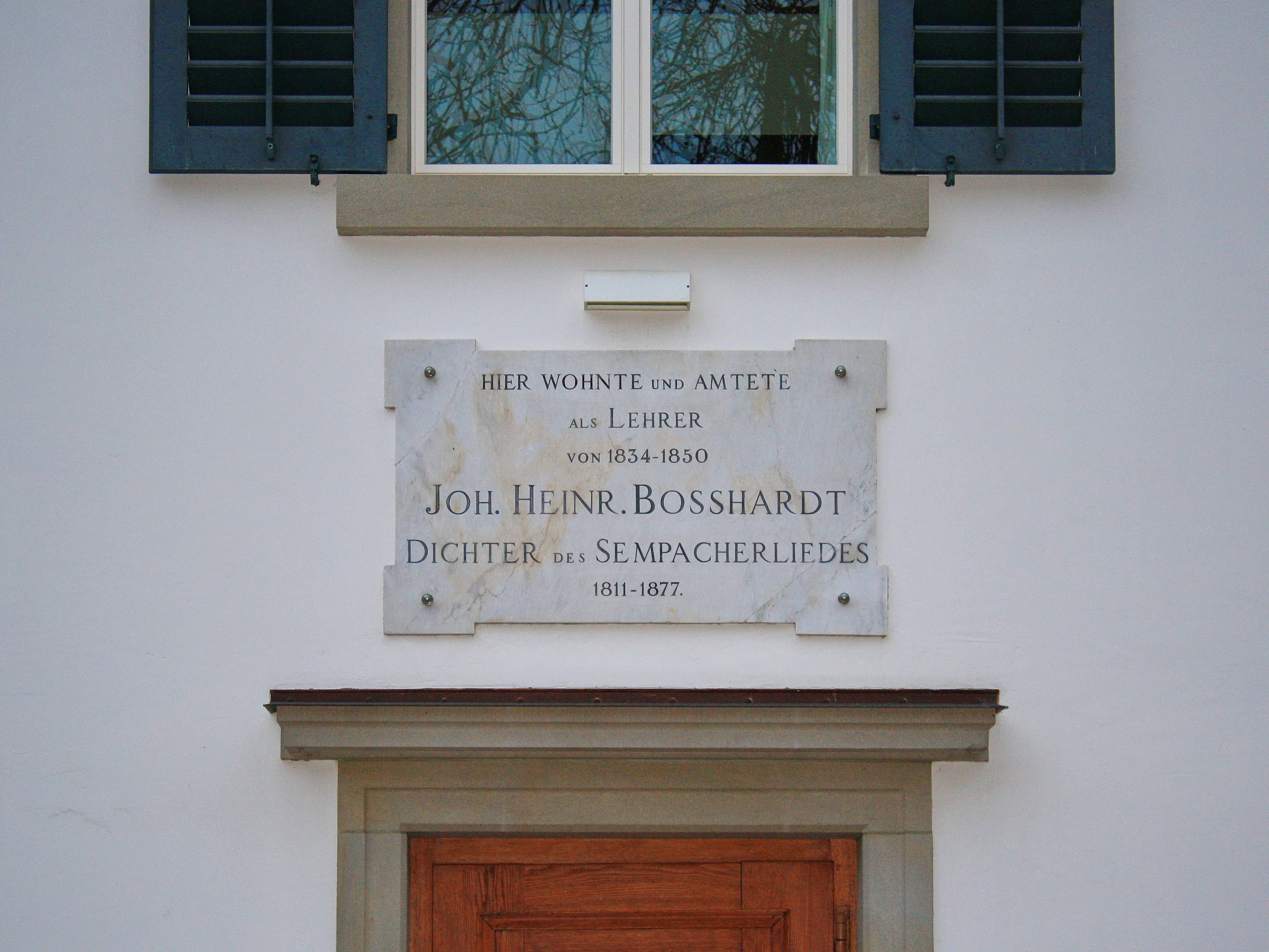 Schulhaus (Johann) Heinrich Bosshardt in Zürich-Schwamendingen (Switzerland)